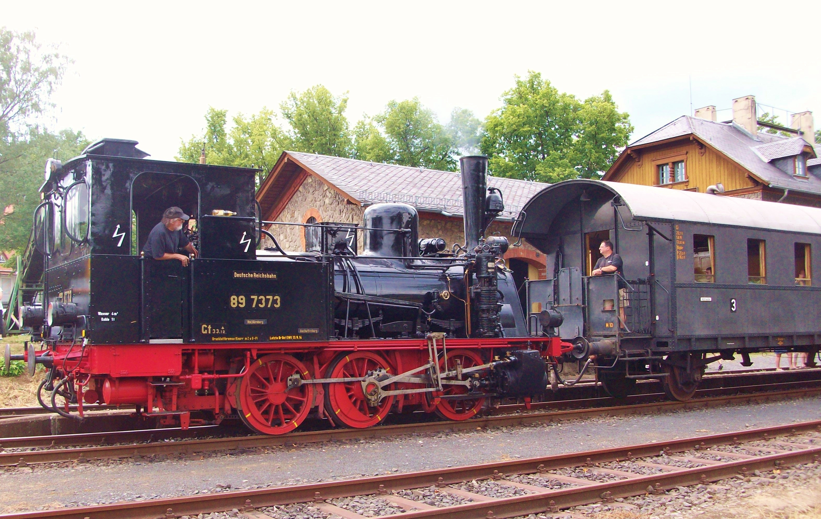 Rhönzügle: Die neu aufgebaute 89 7373 vor Dienstantritt in Fladungen